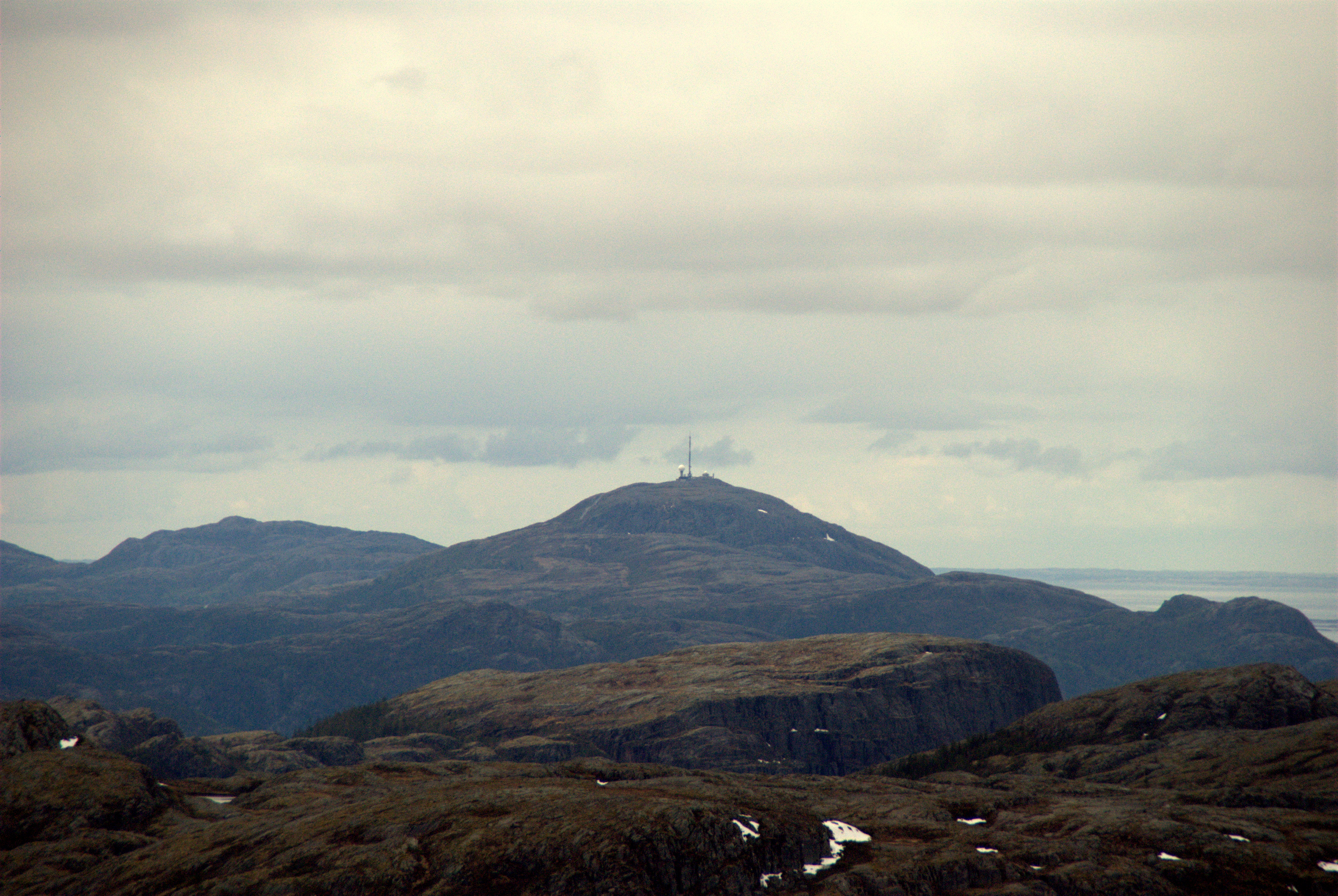 Kopparen (483 moh) i Bjugn kommune i Sør-Trøndelag. Bilde tatt fra Seksortklumpen.